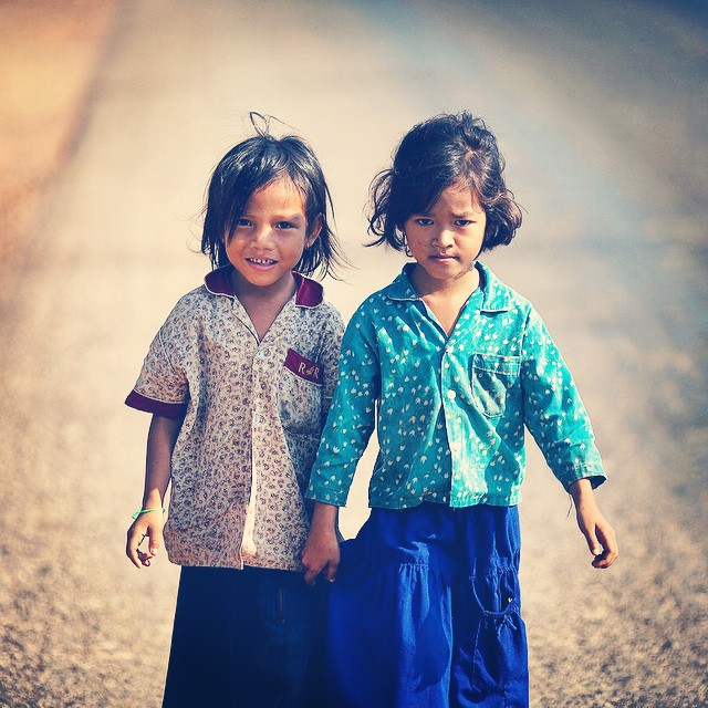 Cambodia. #instalove